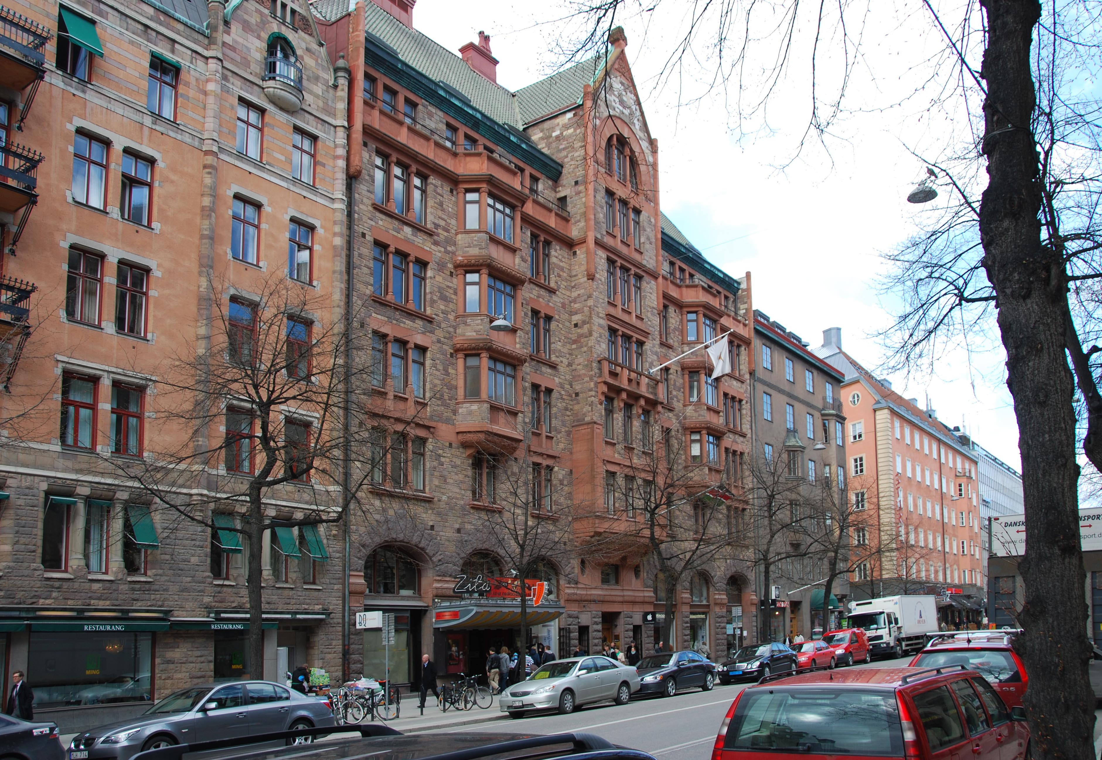 Birger Jarlsgatan 37, Stockholm. Byggt 1910-12.